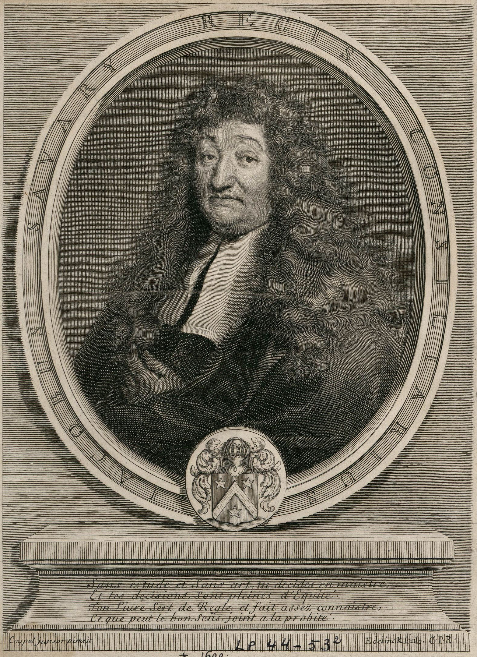 Portrait de Jacques Savary réalisé par Gérard Edelinck d'après une peinture d'Antoine Coypel.